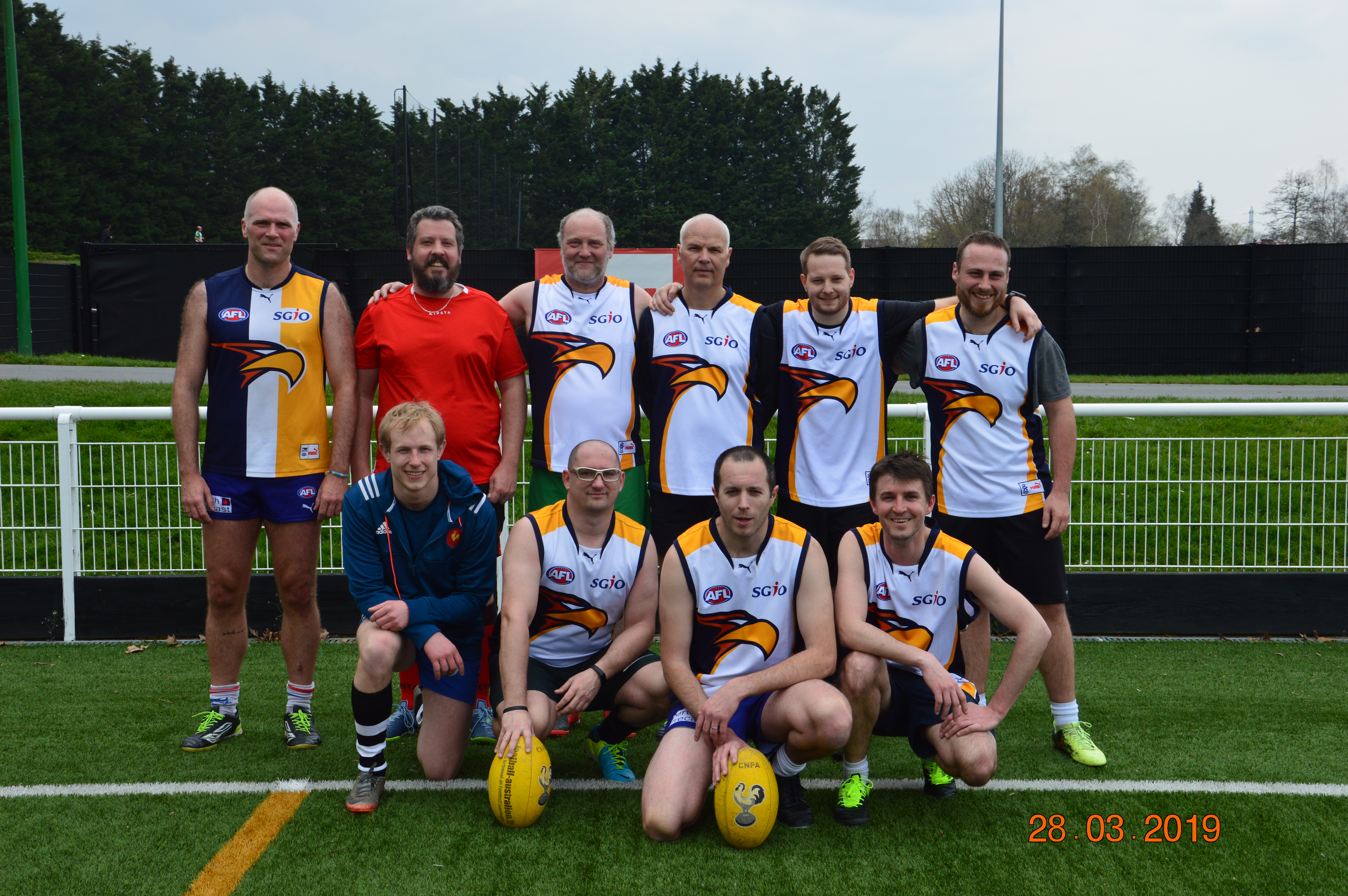 Equipe des Lille Eagles à Villeneuve d'Ascq